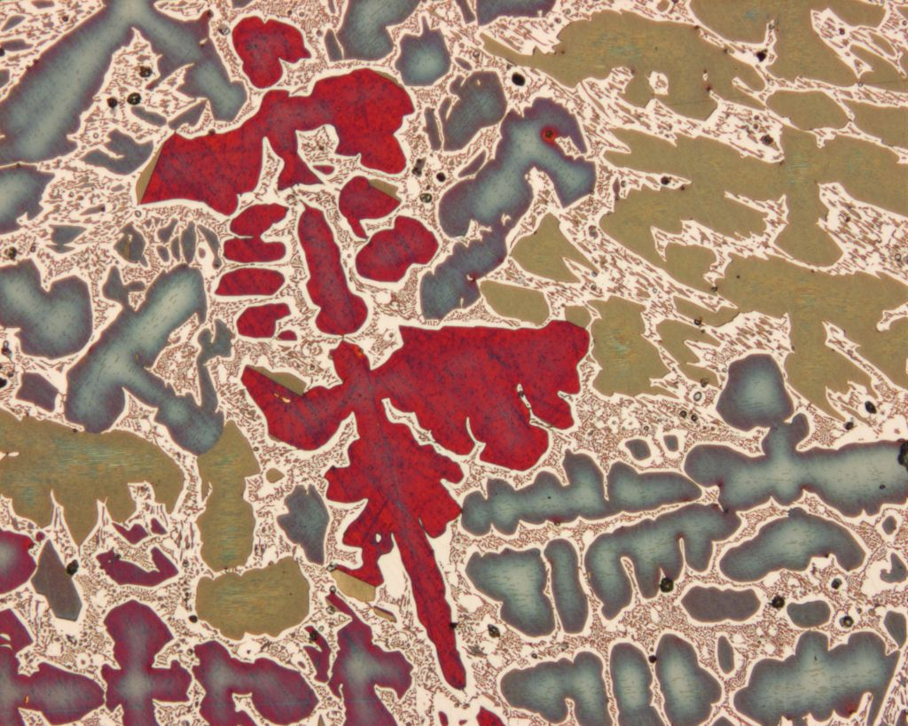 Metallografischer Anschliff einer Glockenbronze, geätzt (Klemm III), V=200:1